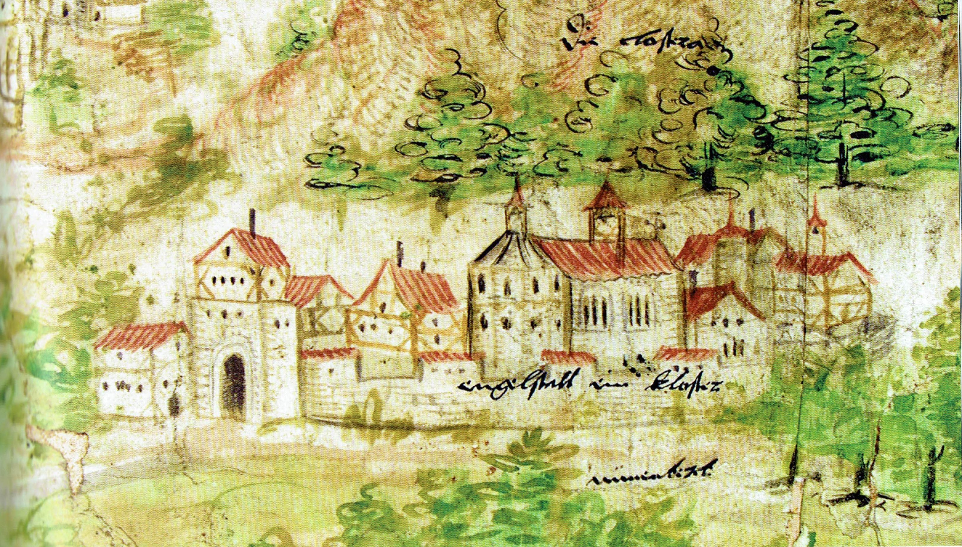 Kloster Engelthal in abstrahierter Ansicht. Staatsarchiv Nürnberg Fürstentum Ansbach karten und Pläne 80